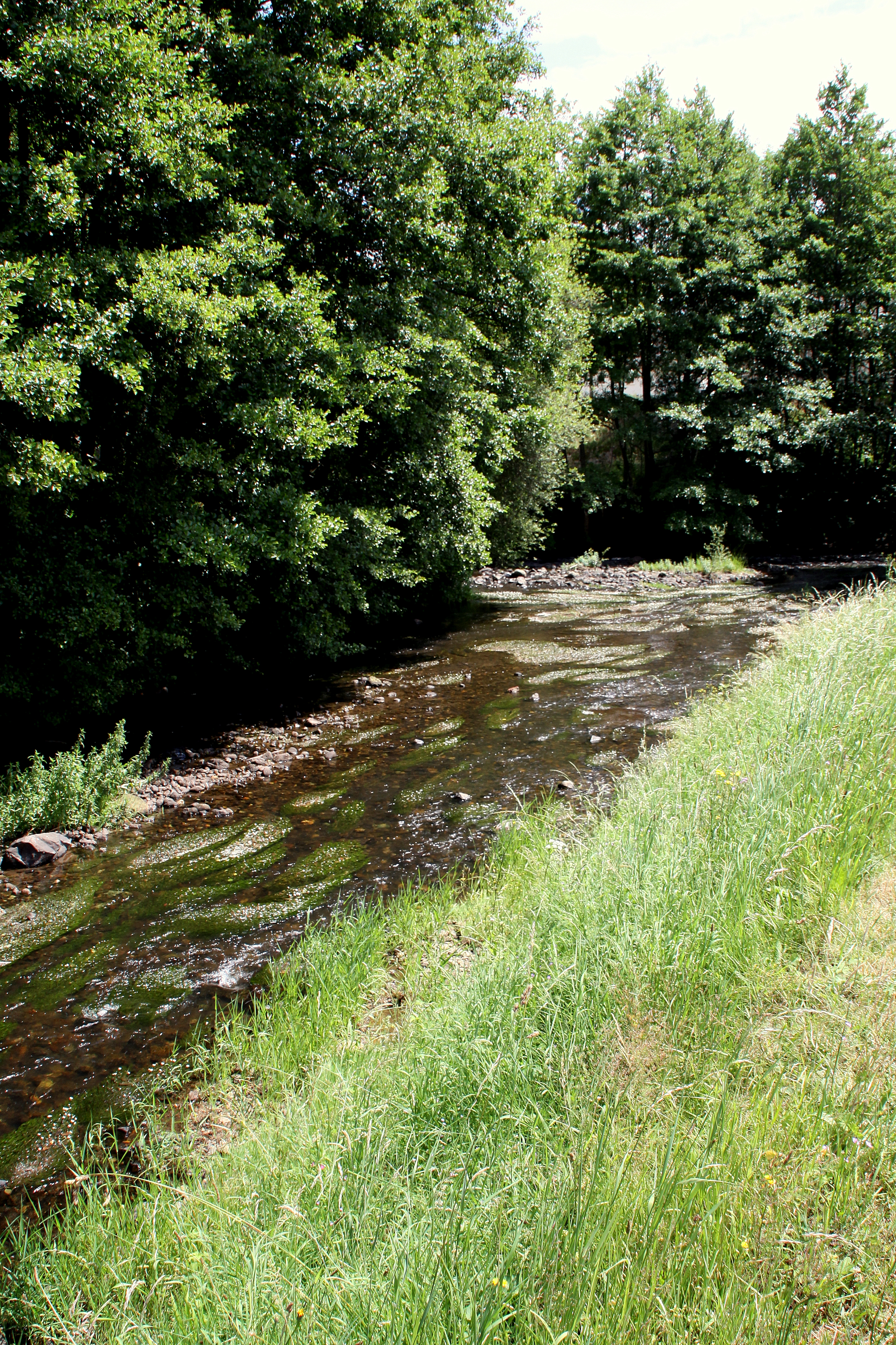 D'Bromme zu Brommat